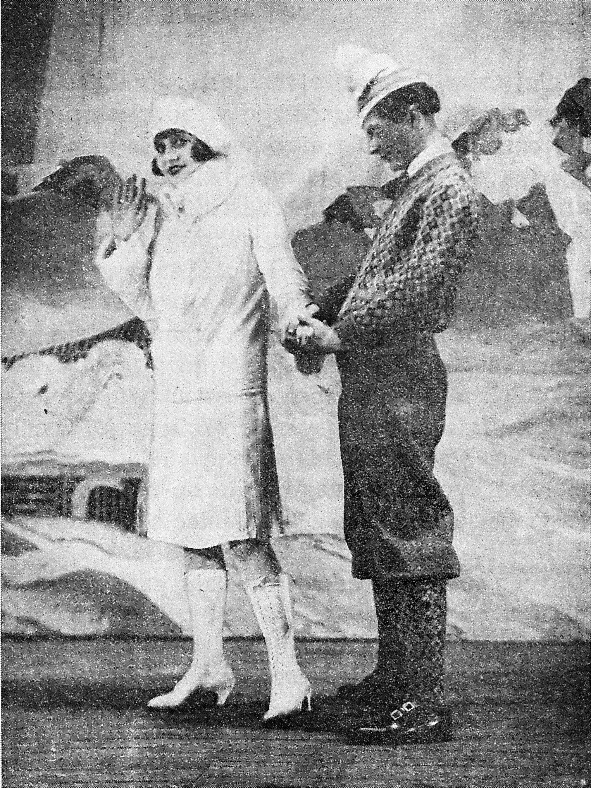 Władysława Jaśkówna i Stanisław Sielański w teatrze "Gong" w Łodzi